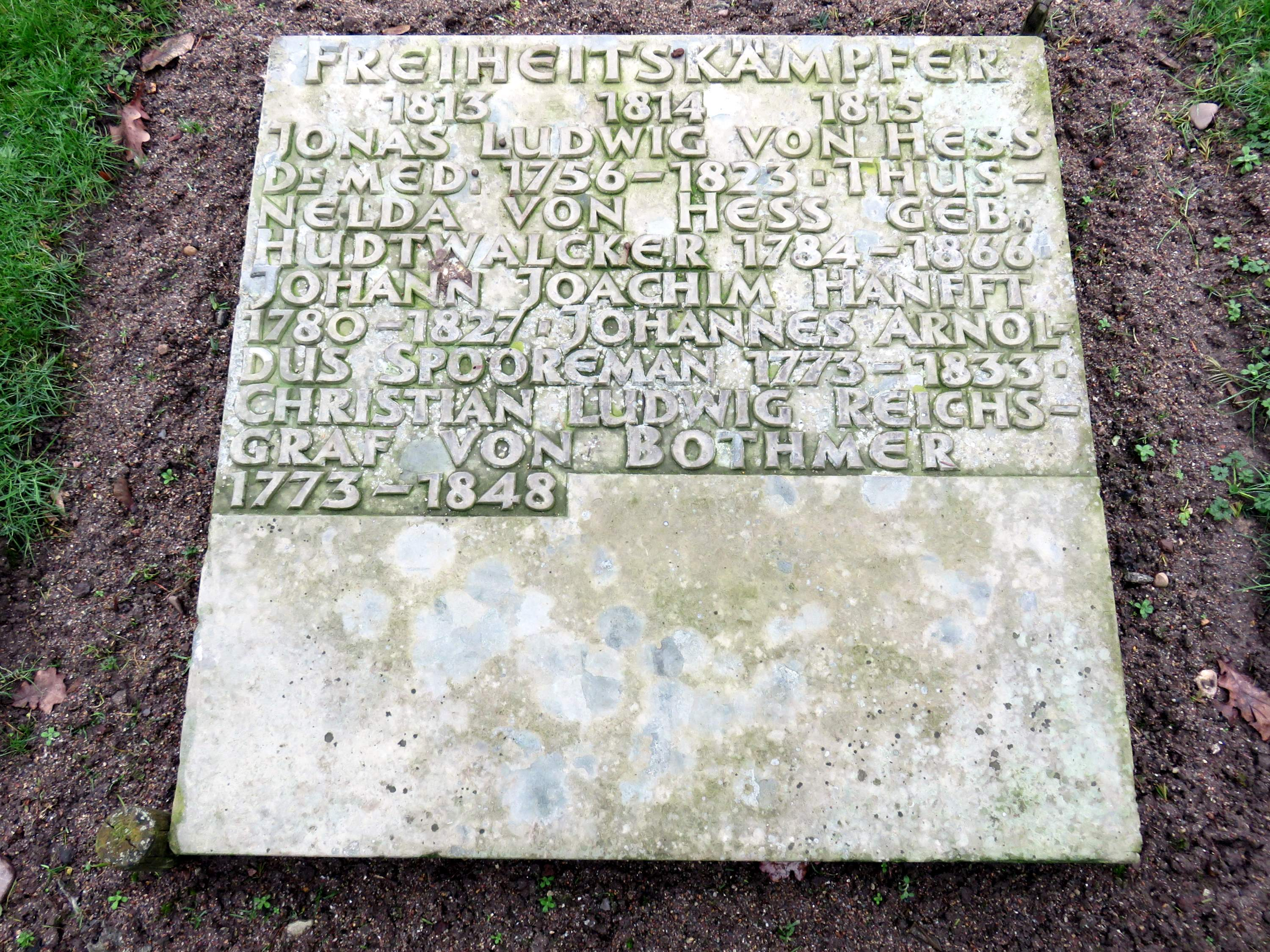 Sammelgrabmal Freiheitskämpfer 1813 1814 1815 im Bereich des Althamburgischen Gedächtnisfriedhofs auf dem Hamburger Friedhof Ohlsdorf, südwestliche Querachse, zu Ehren von u. a. Jonas Ludwig von Hess.